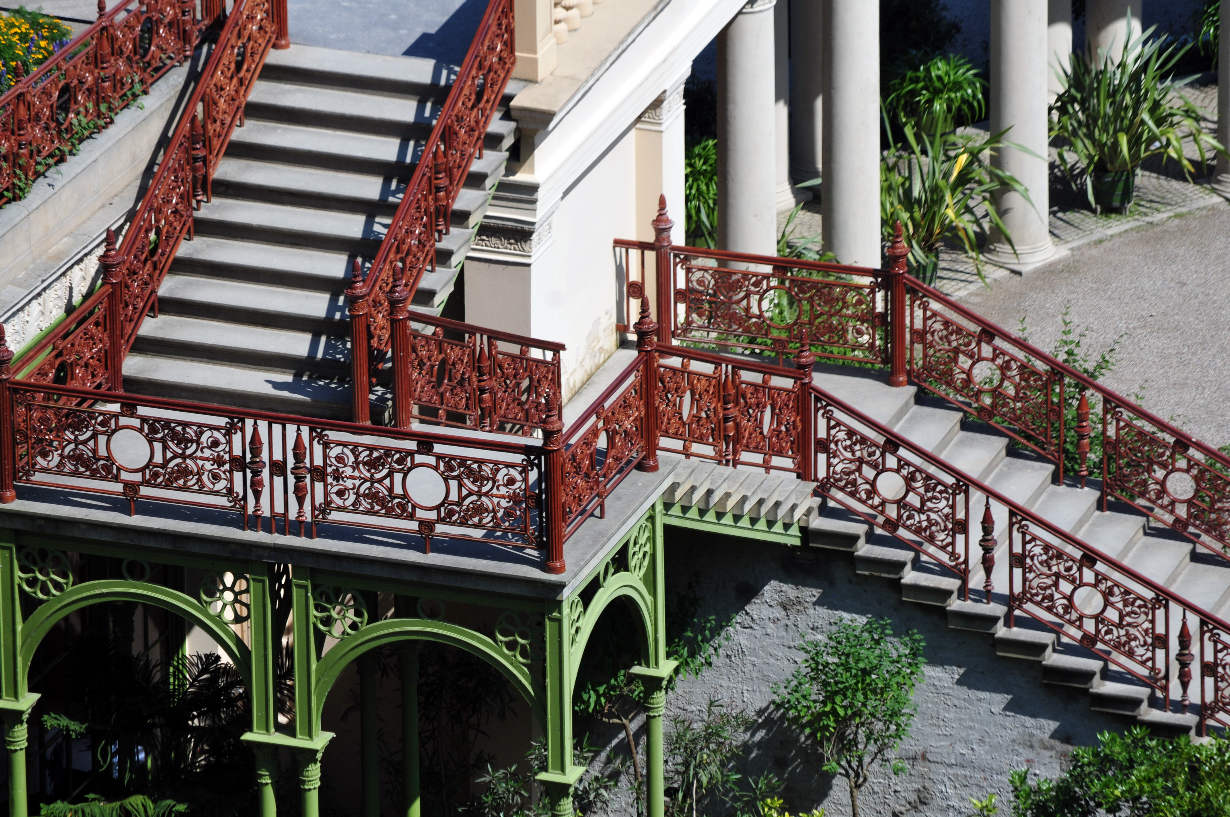 Schweriner Schloß; Orangerie und Schloßgarten